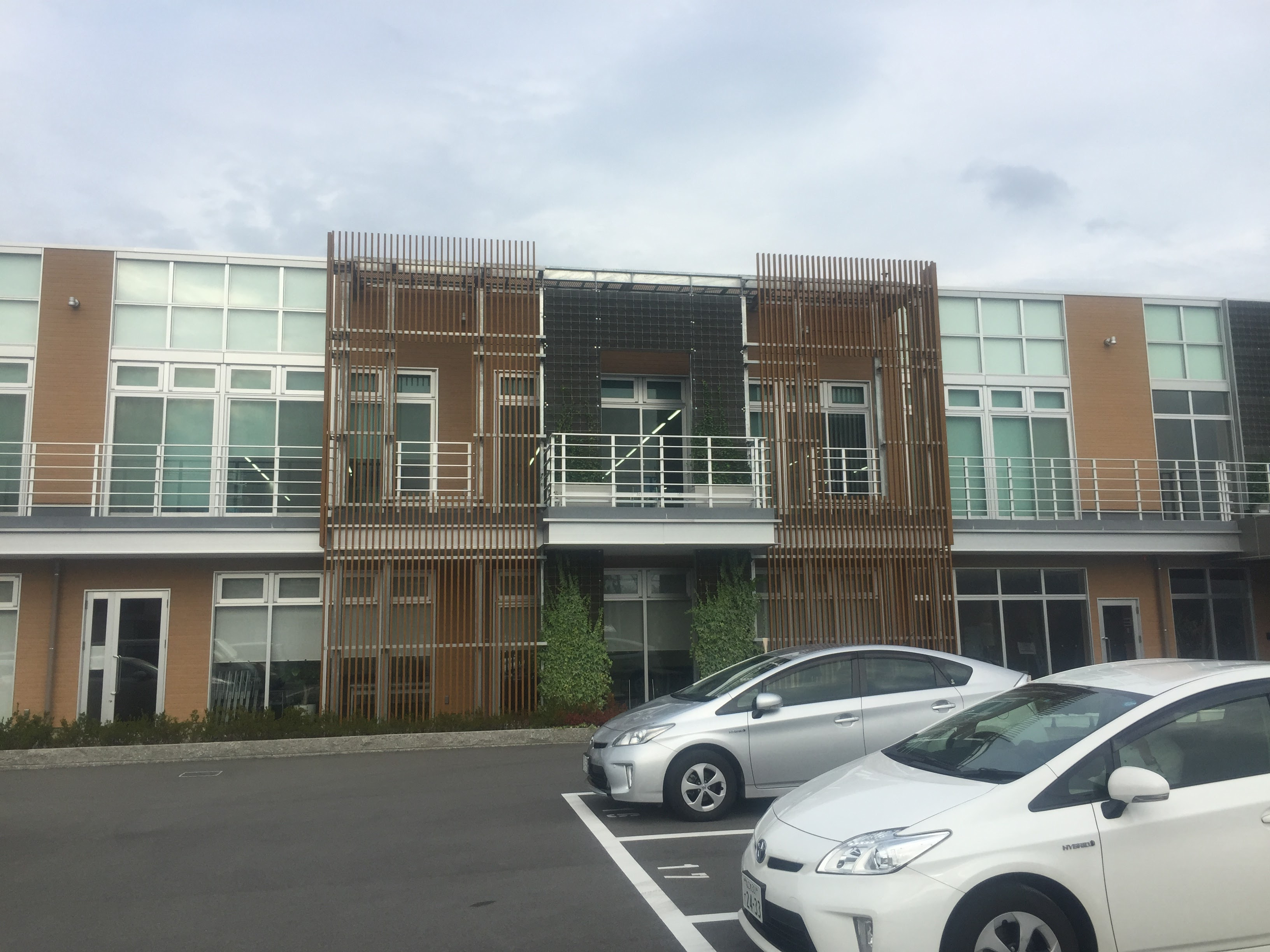 市民生活協同組合ならコープ本部